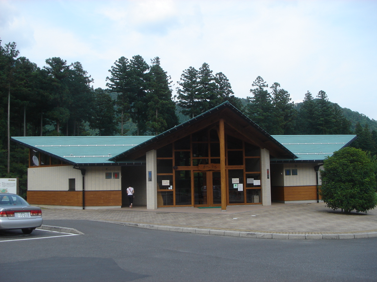 Yume San San anigumi(Roadside station)(道の駅夢さんさん谷汲、情報交流館),Ibigawa,Gifu,Japan(岐阜県揖斐川町)で撮影